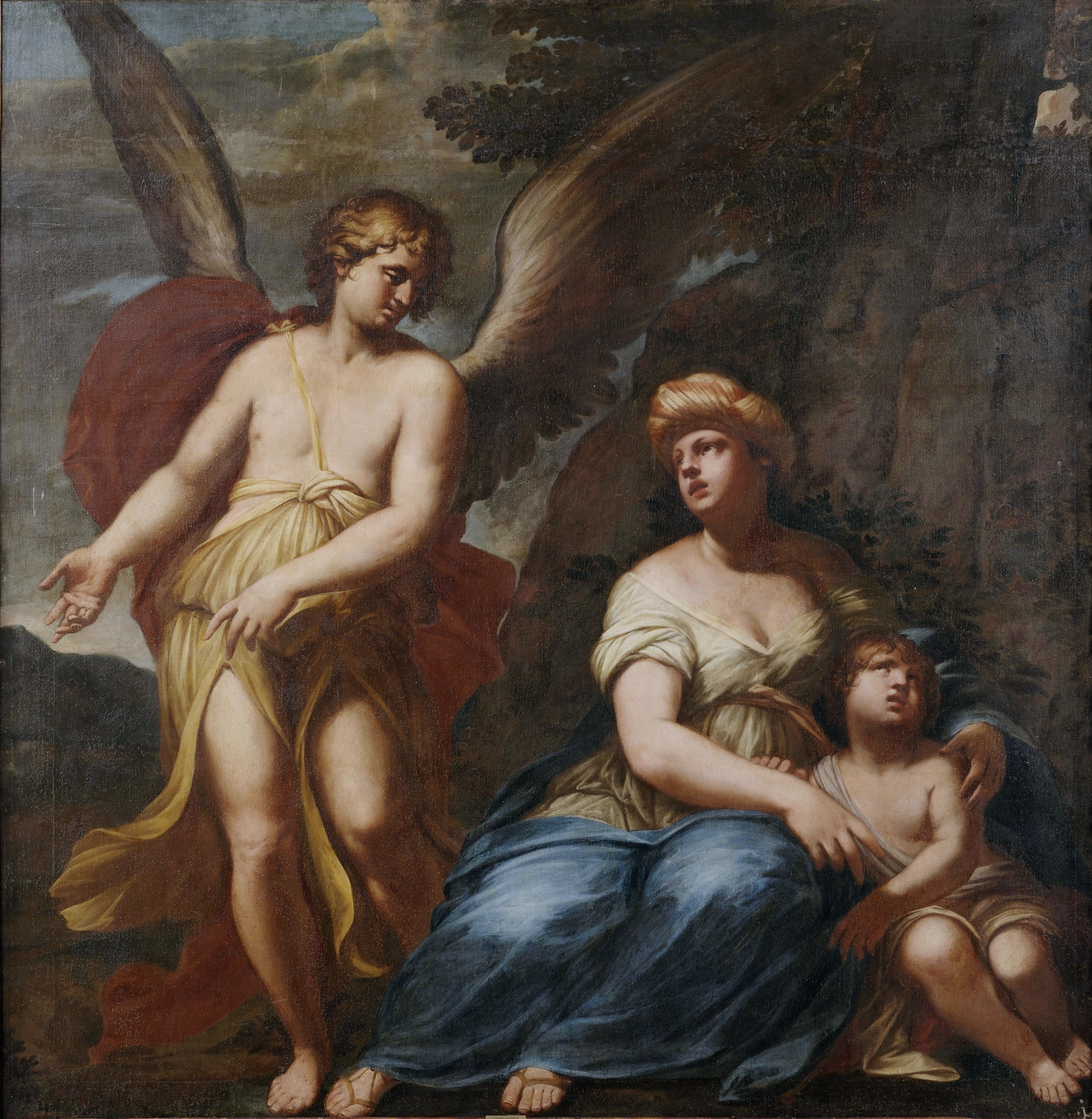 Der Engel zeigt Hagar und Ismael den Weg zum rettenden Brunnen.